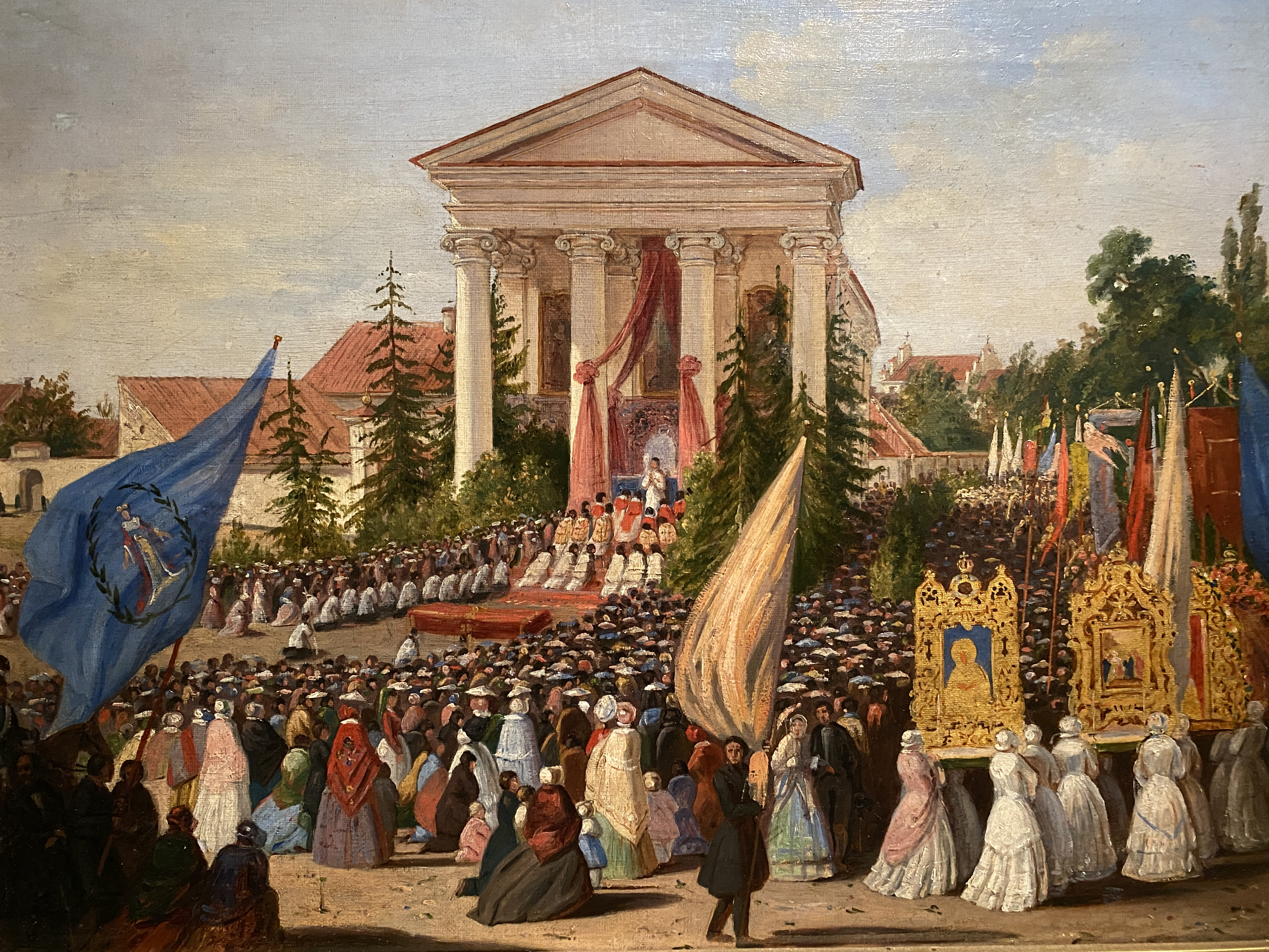 Беларуская (тарашкевіца): Вільня (Vilnia), рог пляцу Палацавага (plac Pałacavy) і вуліцы Ўнівэрсытэцкай (vulica Ŭniversyteckaja). Працэсія Божага Цела перад палацам дэ Рэўсаў